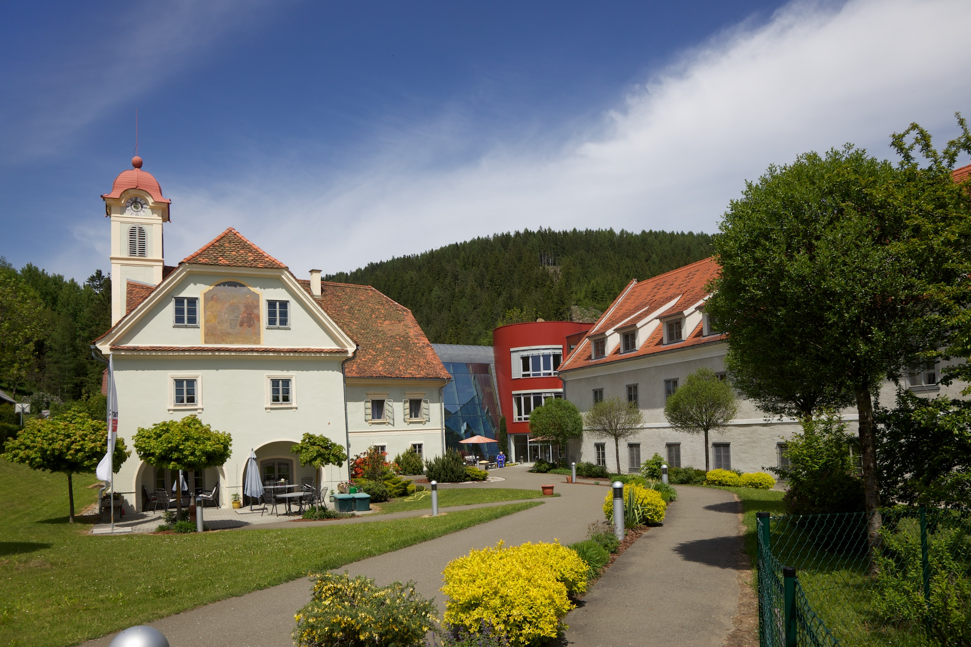 Ansitz, Schloss Wasserleith